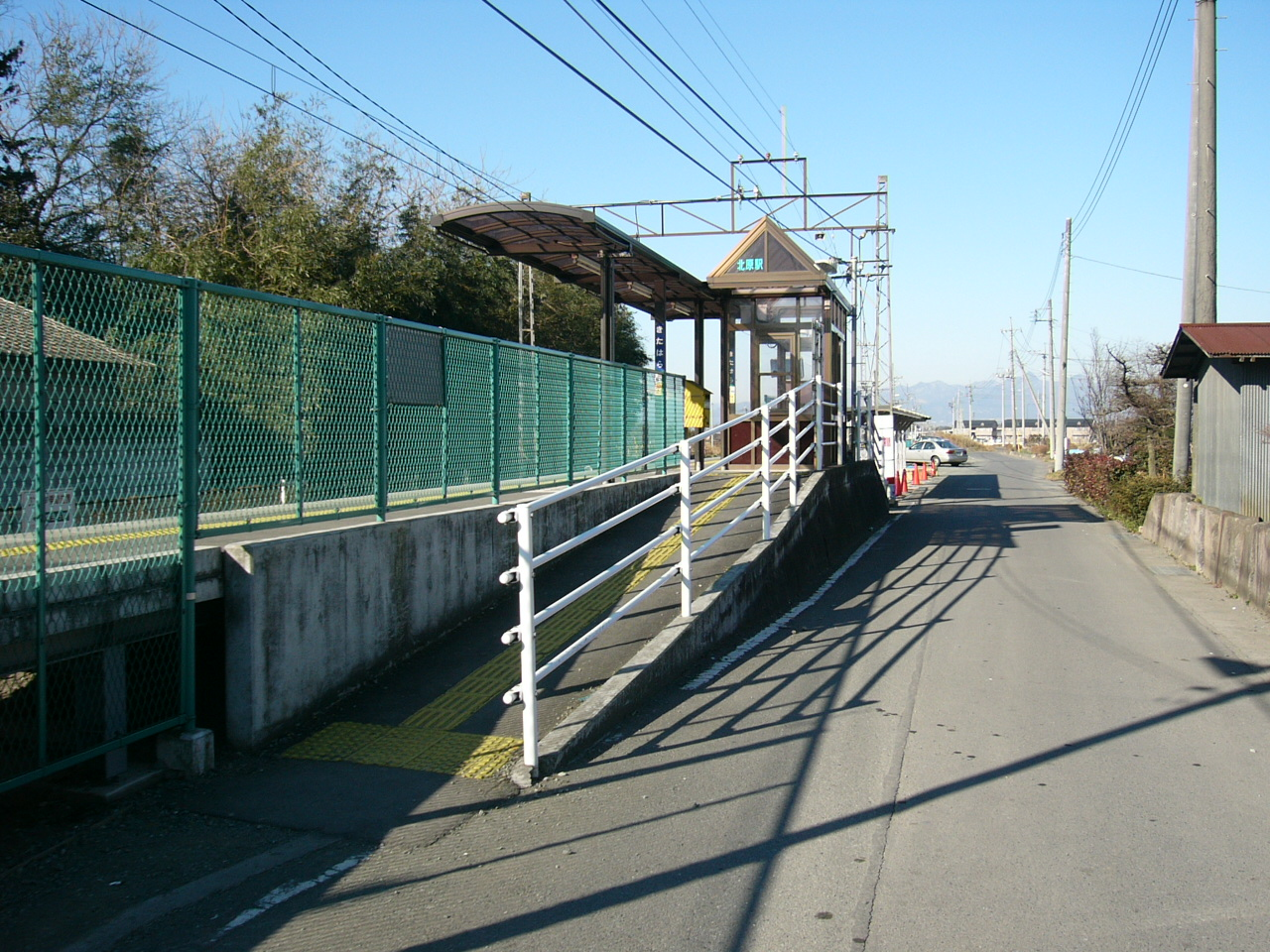 Kitahara Station